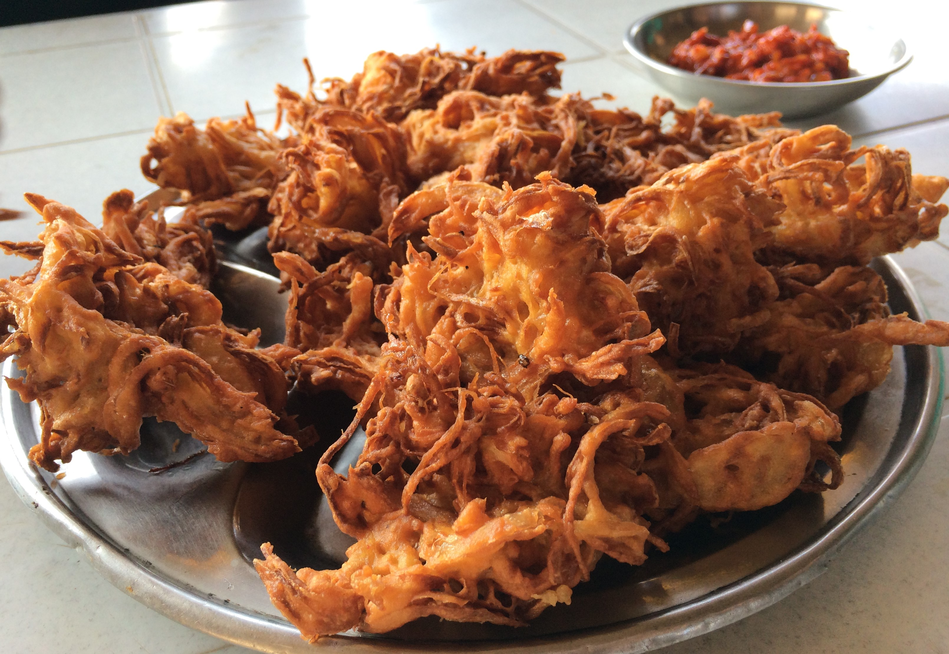 One of the famous dishes you'll get to eat when you visit Sinhagad Fort near Pune